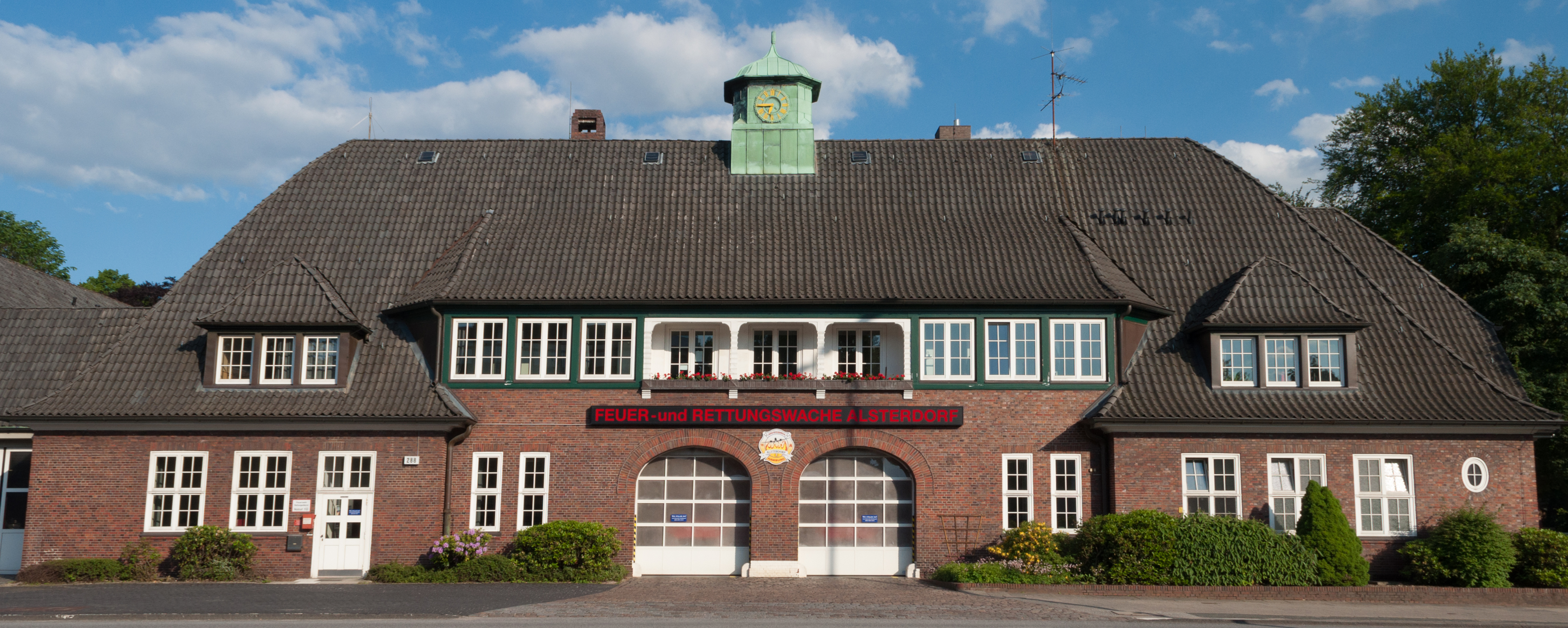 Feuerwache Alsterdorf in Hamburg-Alsterdorf. This is a photograph of an architectural monument.